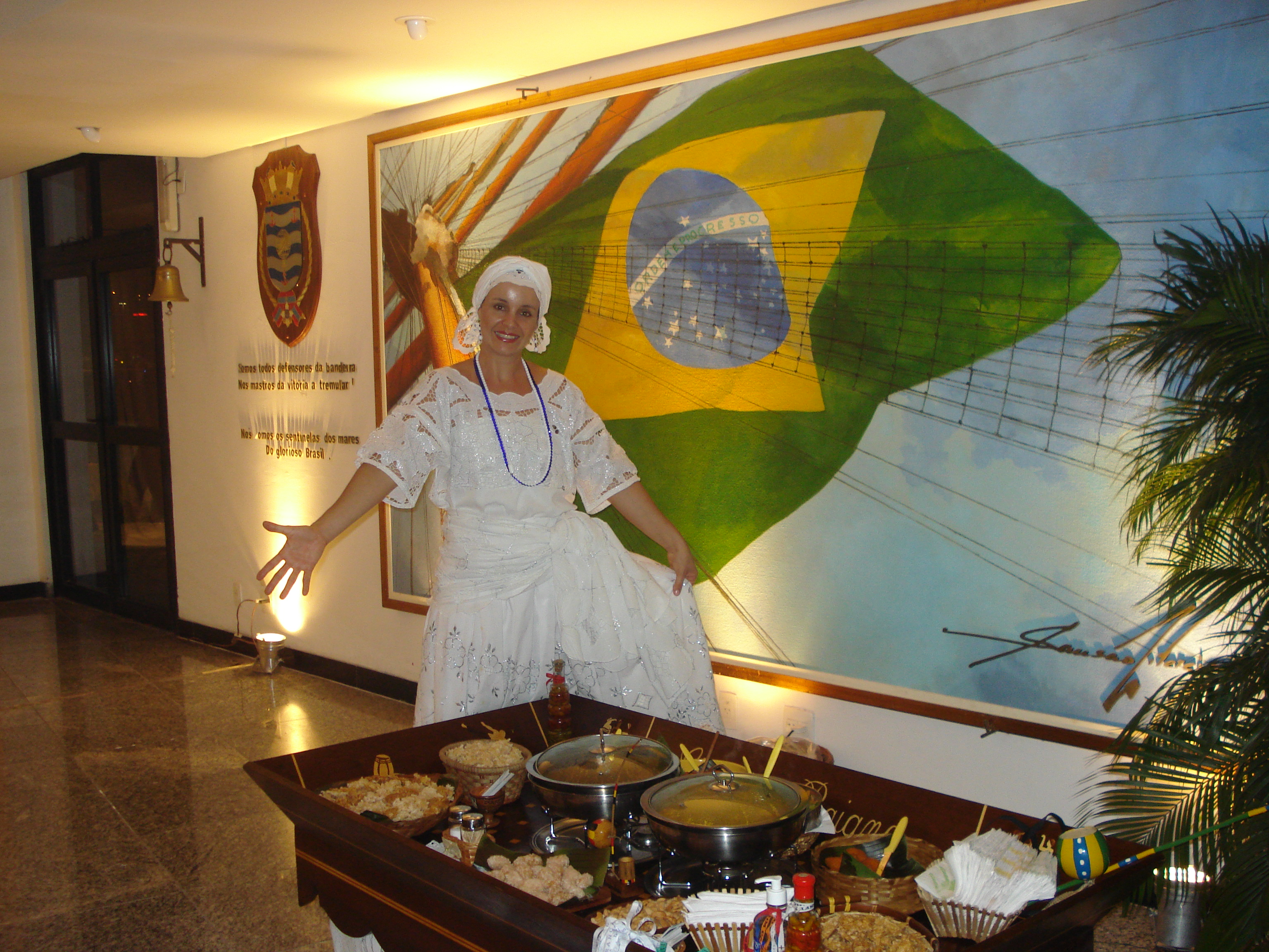 Acarajé da Claudia Baiana Faça seu evento diferente, com requinte e sabor.